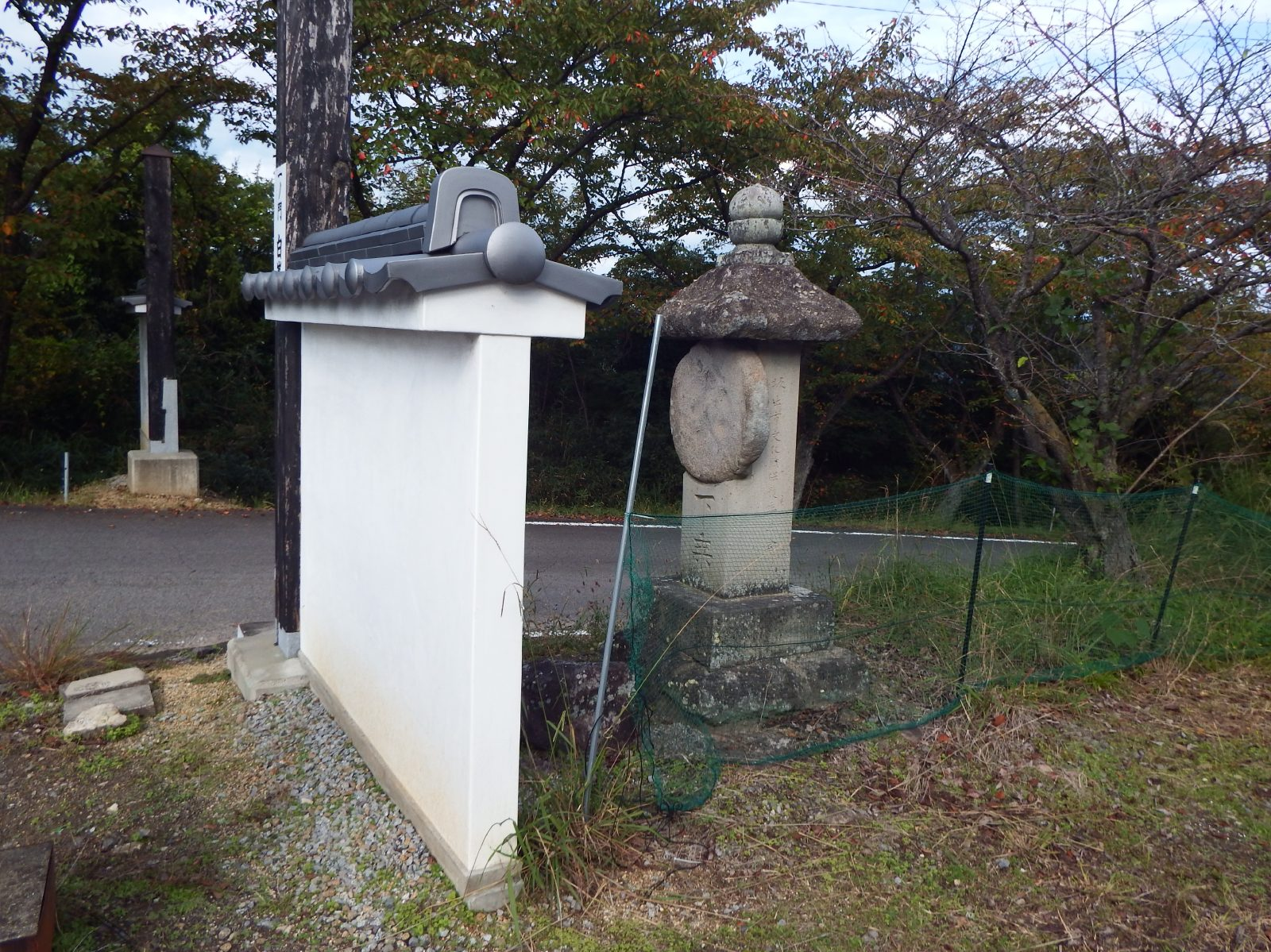 白峯寺の一ノ門と下乗石（再建）